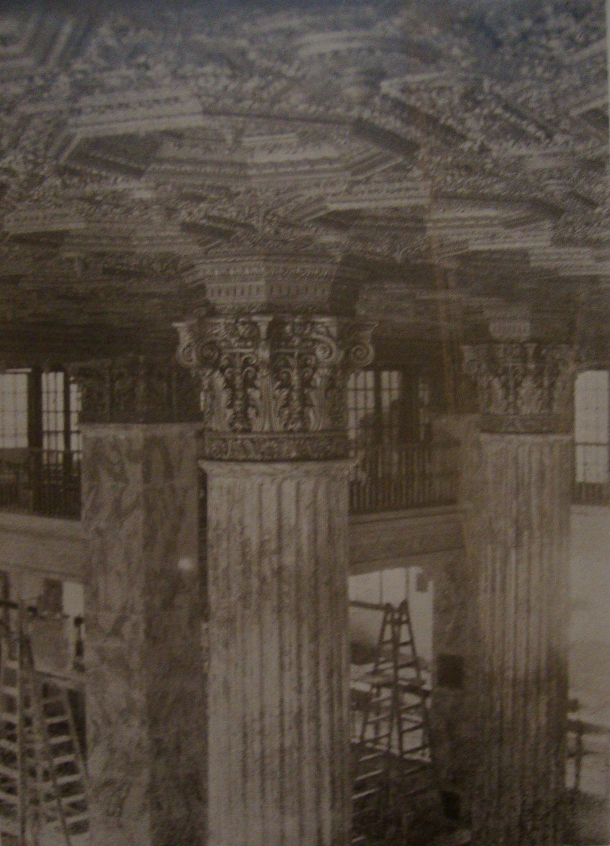 Gran salón del edificio construido para el Banco de Boston (hoy Standard Bank) en el cruce de la Avenida Roque Sáenz Peña y las calles Florida y Bartolomé Mitre. Fue inaugurado en 1924 y proyectado por los arquitectos Chambers & Thomas.